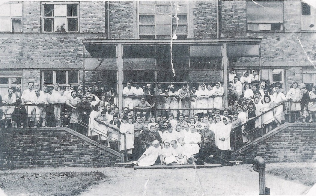 Szczecin,1945-1950r. Najstarsze zdjęcie załogi szpitala wojskowego